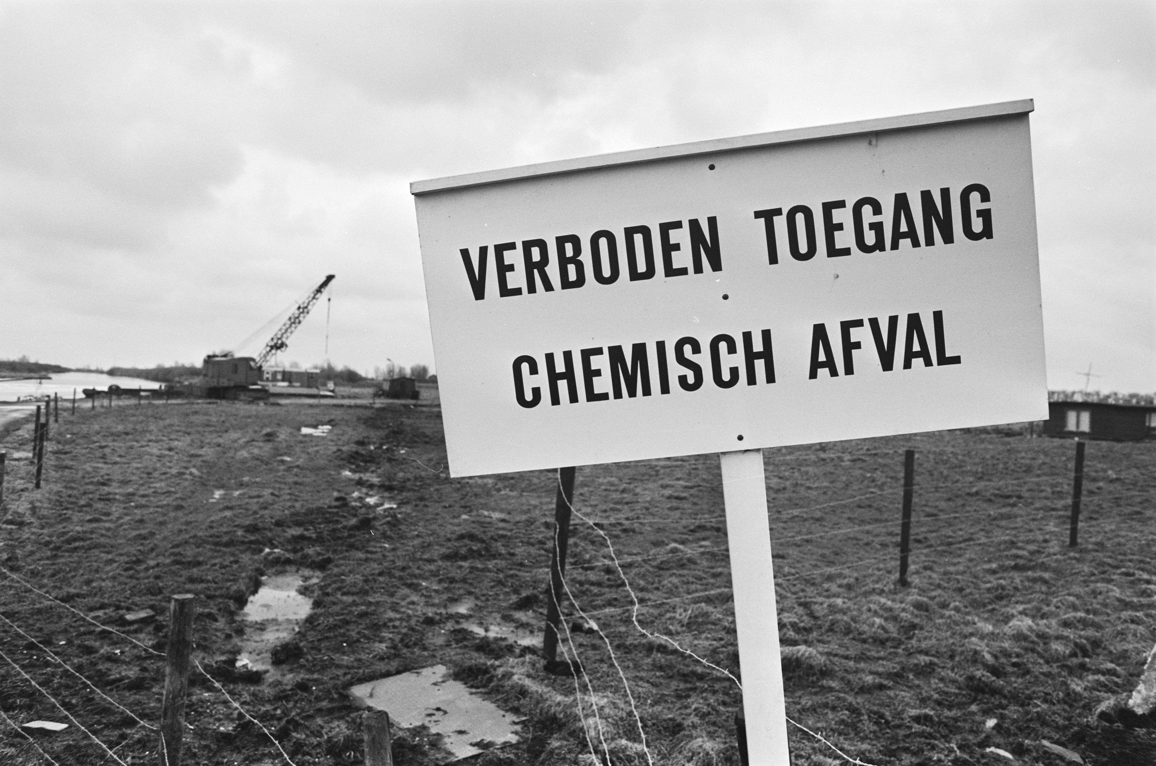 Collectie / Archief : Fotocollectie Anefo Reportage / Serie : Bord met tekst "Verboden toegang, chemisch afval" bij vuilnisstortplaats in Volgermeerpolder Beschrijving : Bord bij vuilnisstortplaats in Volgermeerpolder Datum : 5 februari 1981 Locatie : Amsterdam, Noord-Holland, Volgermeerpolder Trefwoorden : afvallozingen, borden, chemisch afval, hijskranen, vuilstortplaatsen Fotograaf : Antonisse, Marcel / Anefo, [onbekend] Auteursrechthebbende : Nationaal Archief Materiaalsoort : Negatief (zwart/wit) Nummer archiefinventaris : bekijk toegang 2.24.01.05 Bestanddeelnummer : 931-3041